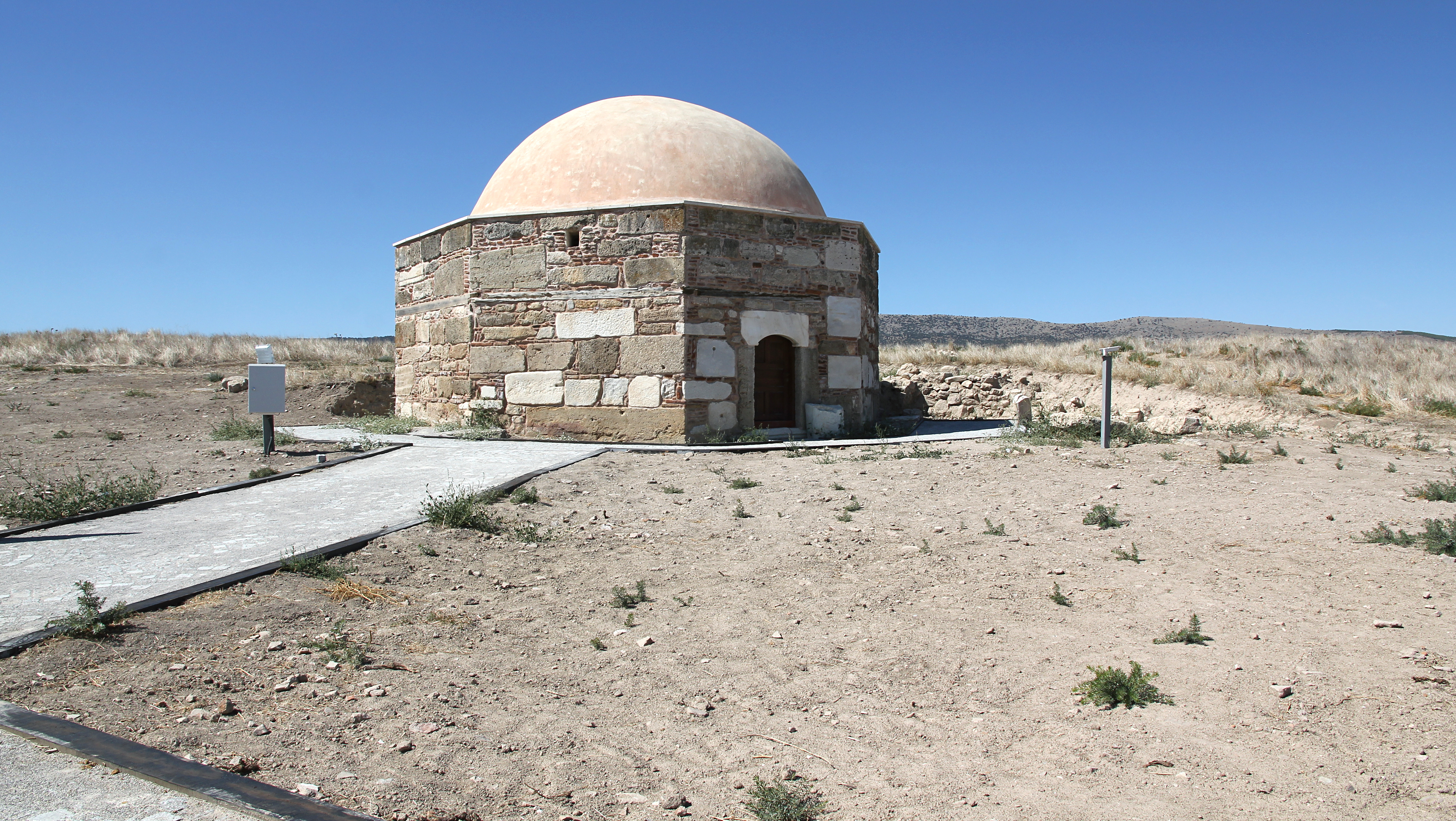 Beycesultan, Siedlungshügel bei Çivril in der westtürkischen Provinz Denizli, Türbe von Beyce Sultan